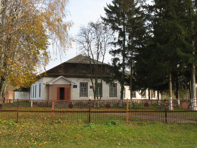 Чернігівська обл., Менський р-н, с. Киселівка. Школа.